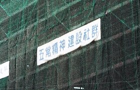 2004-03-18早上攝於香港堅尼地城市建局的重建地盤(by Jeanie Woo)